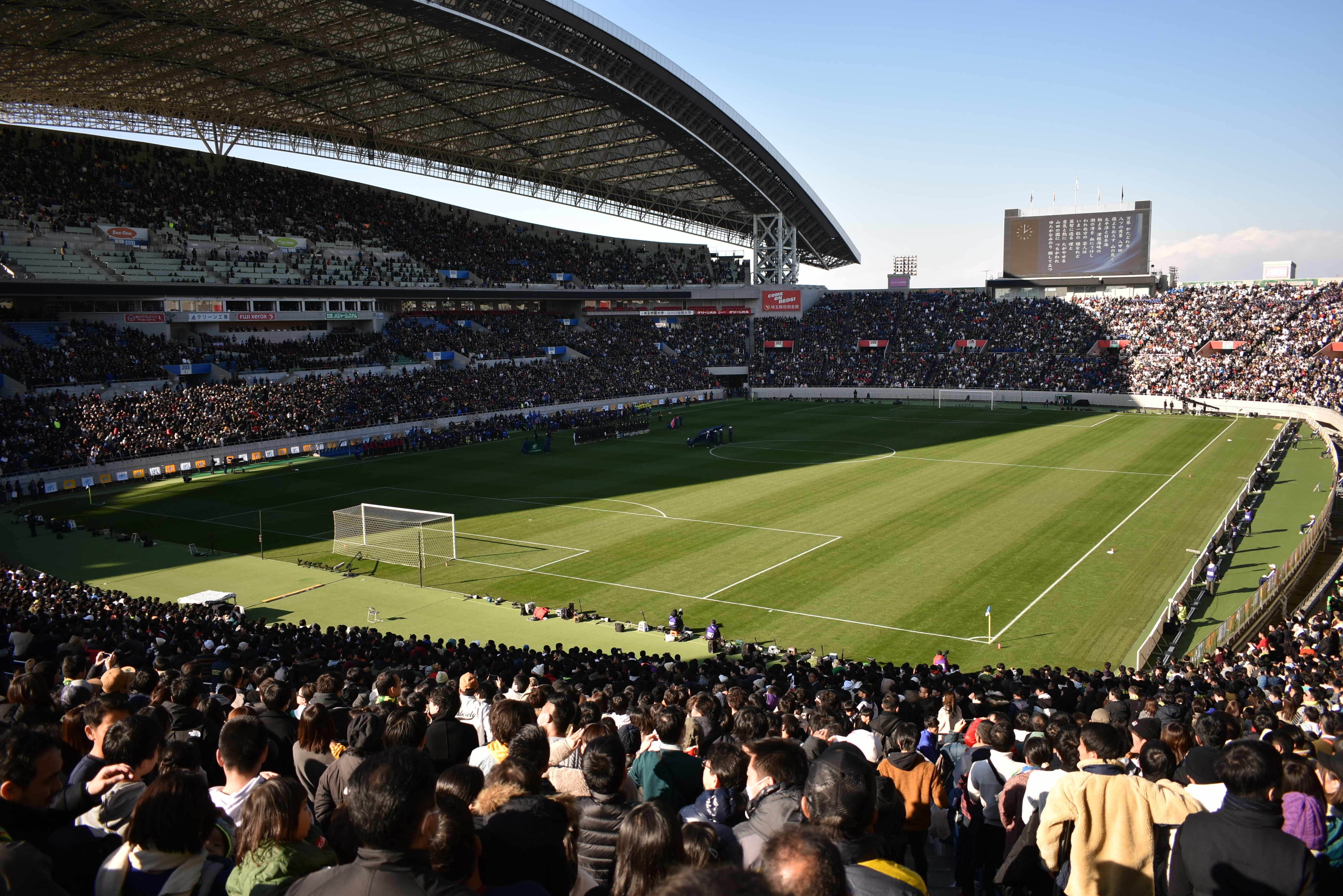 埼玉スタジアム2002